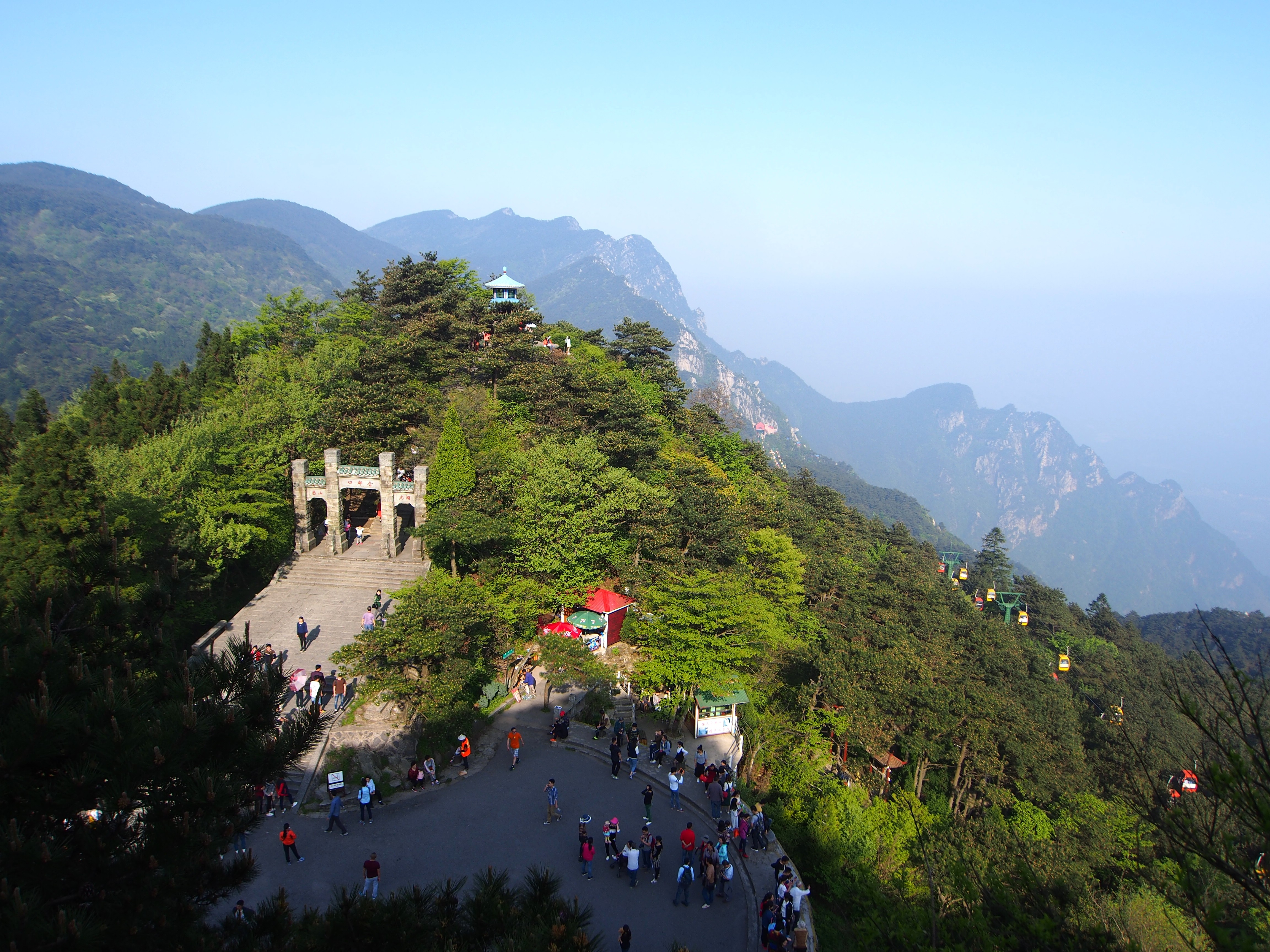 含鄱口 - Hanpo Pass - 2016.04